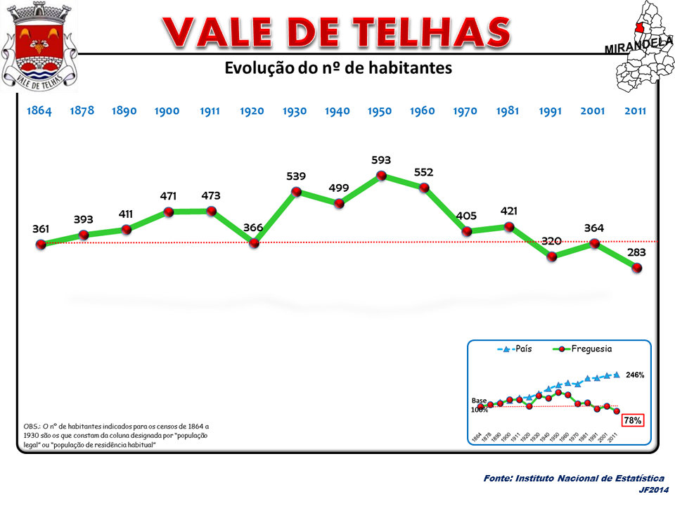 Evolução da População 1864 / 2011